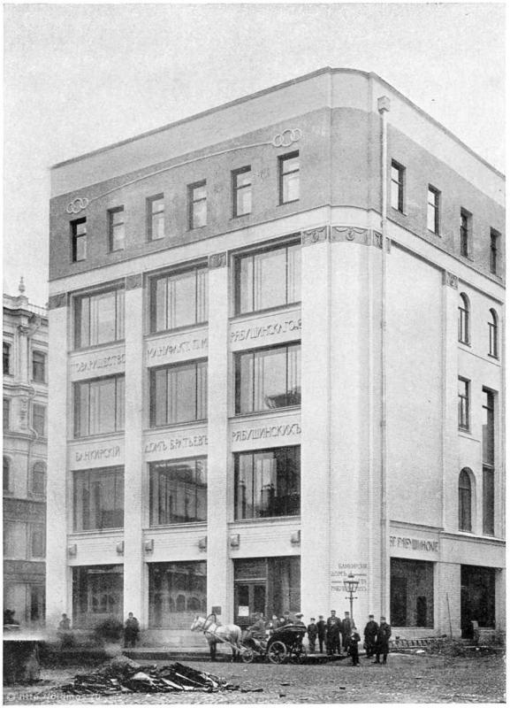 Ф. О. Шехтель. Банкирский дом братьев Рябушинских и Главная контора Товарищества мануфактур П. М. Рябушинского с сыновьями